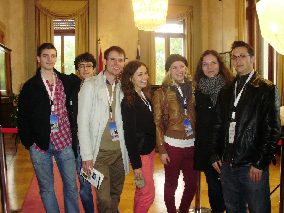 At4Hu Múzeumlátogatás